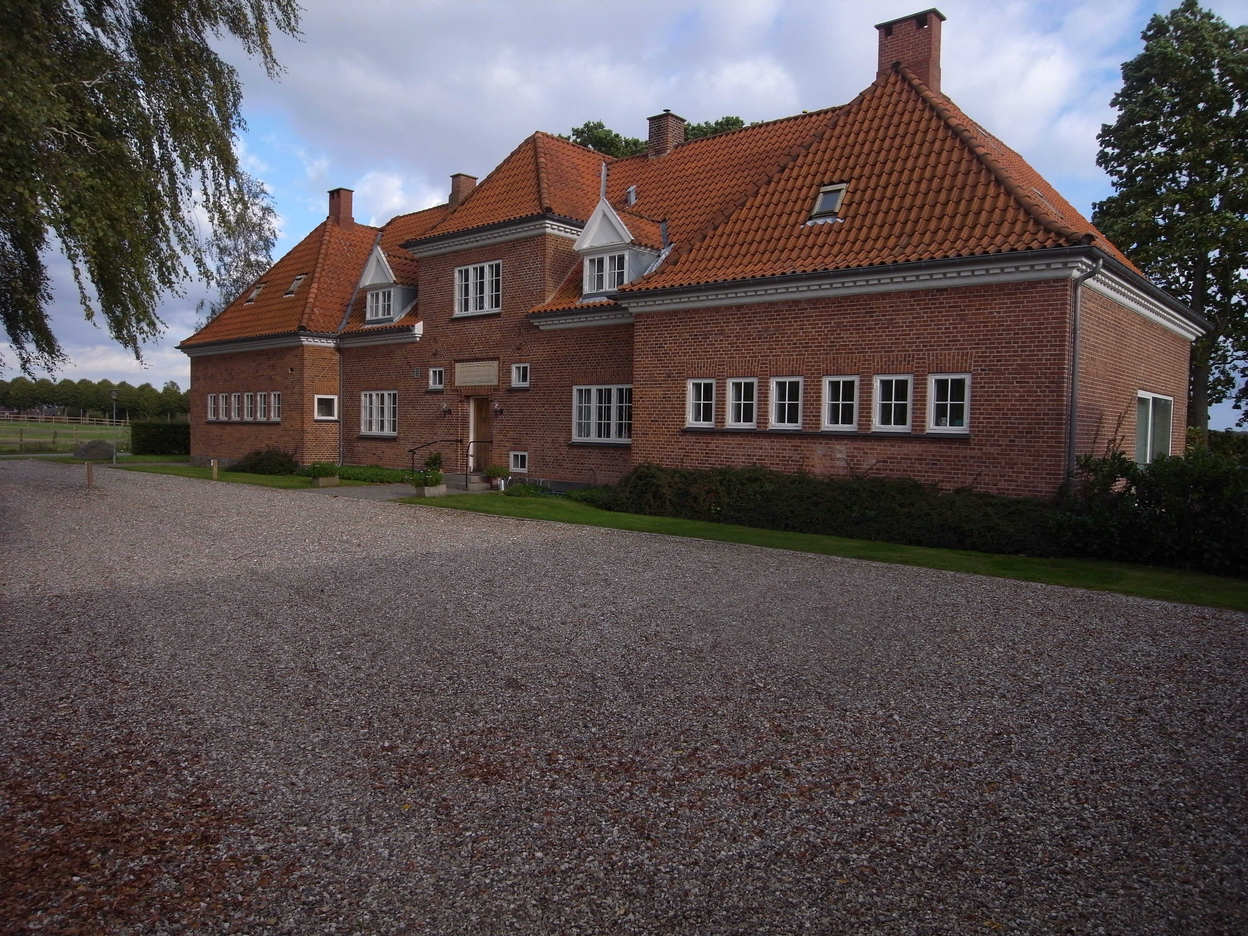 Grønholt gamle skole, Præstemosevej 38, set fra gårdspladsen mod øst. Skolen er tegnet af arkitekten Carl Harild (1868-1932).